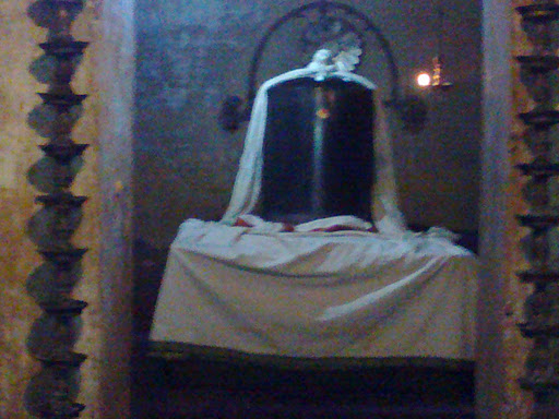 DHAKESHNAPURIESWER